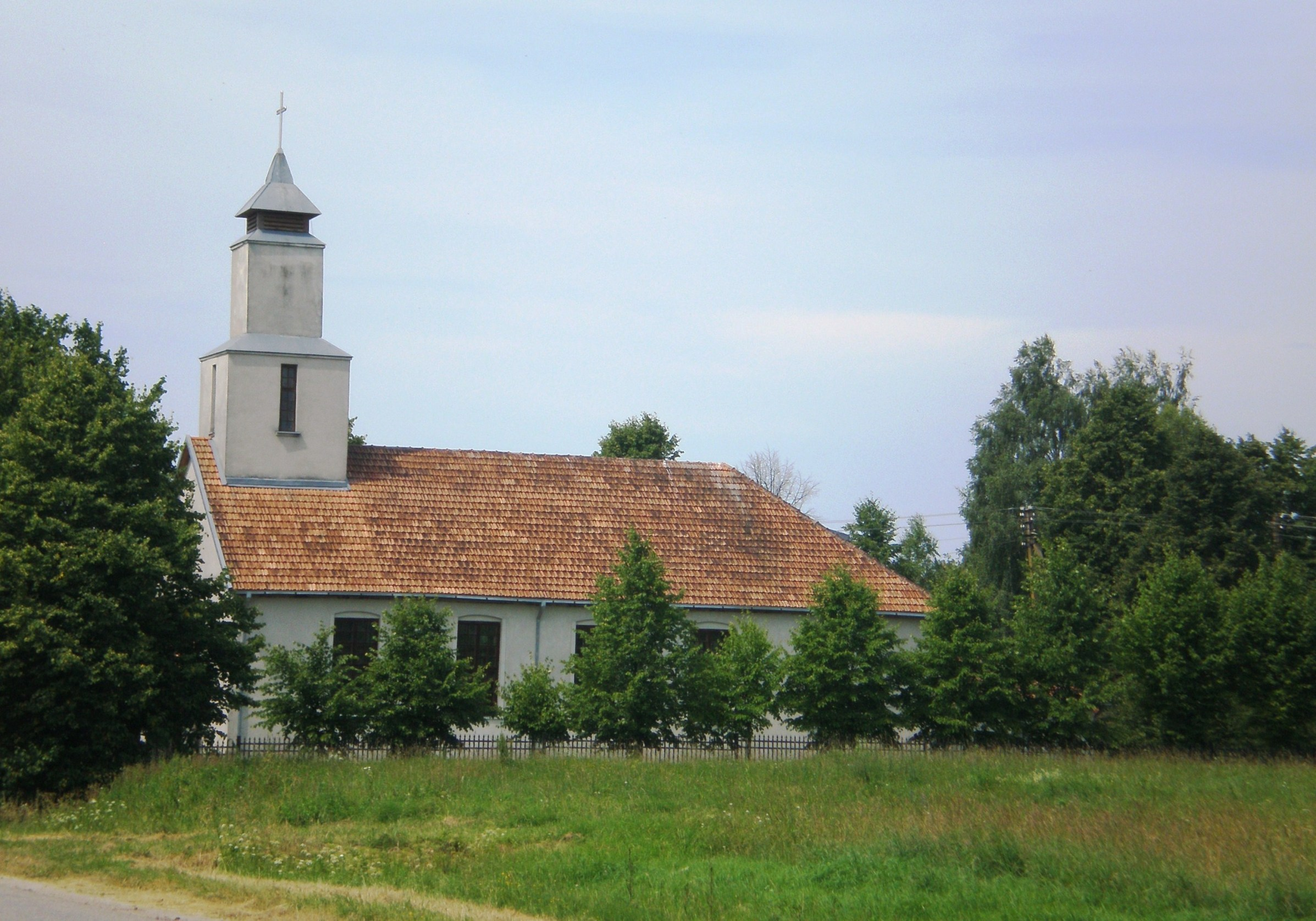 liuteronų bažnyčia, Vištytis, Vilkaviškio raj.